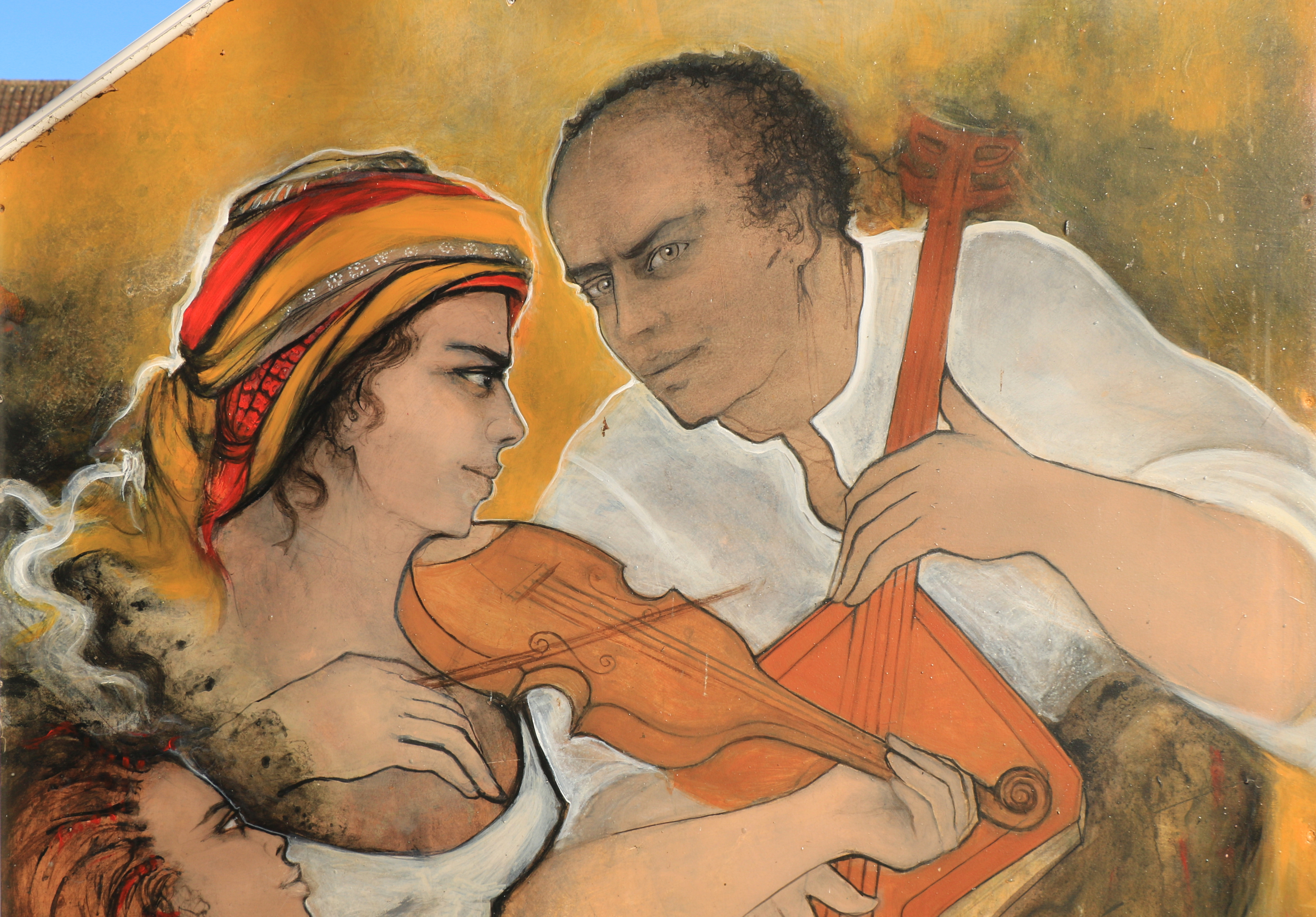 Belgique - Louvain-la-Neuve - Allégorie de l'interculturalité (Roxana Alvarado 2007) - Musiciens